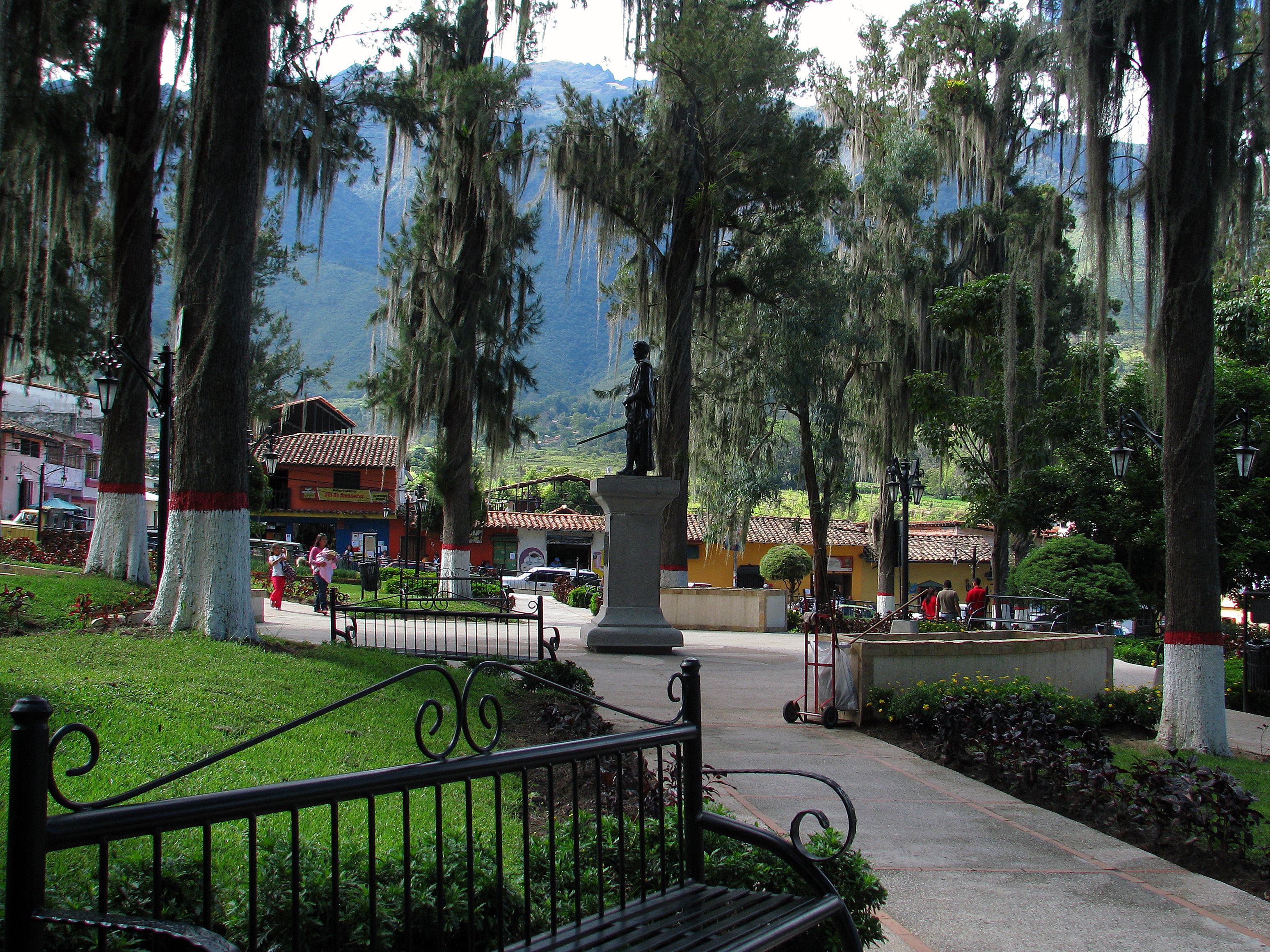 Plaza Bolívar de Tabay de día.